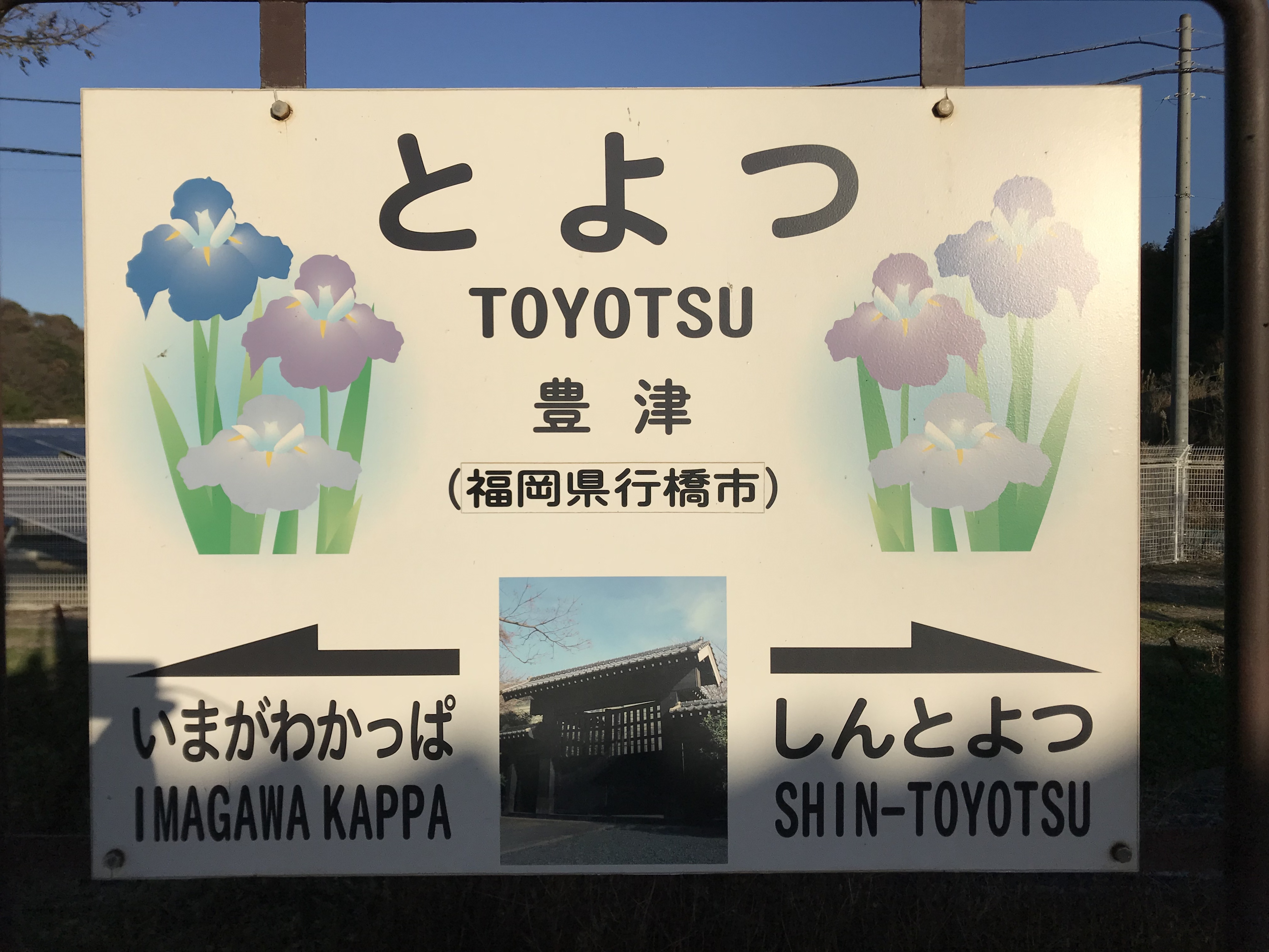 豊津駅の駅名標。イラストはみやこ観光まちづくり協会の門